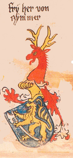 Ingeram-Codex der ehemaligen Bibliothek Cotta herr von zymmer freigestellt aus